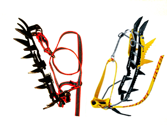 Klim Crampons (Klimmateriaal)